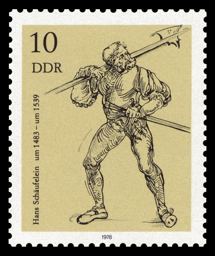 Information: Kupferstichkabinett der Staatlichen Museen Berlin: Zeichnungen: „Landsknecht mit geschulterter Hellebarde“; von Hans Schäufelein Ausgabepreis: 10 Pfennig First Day of Issue / Erstausgabetag: 25. Juli 1978 Auflage: 2.100.000 Entwurf: Naumann Druckverfahren: Offsetdruck Michel-Katalog-Nr: Ländercode-MiNr: 2347